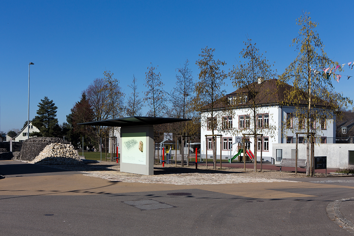 Dorfzentrum von Kaiseraugst (AG) mit römischer Kastellmauer, Info-Tafel zum Kastell, Dorfschulhaus und Parkhaus